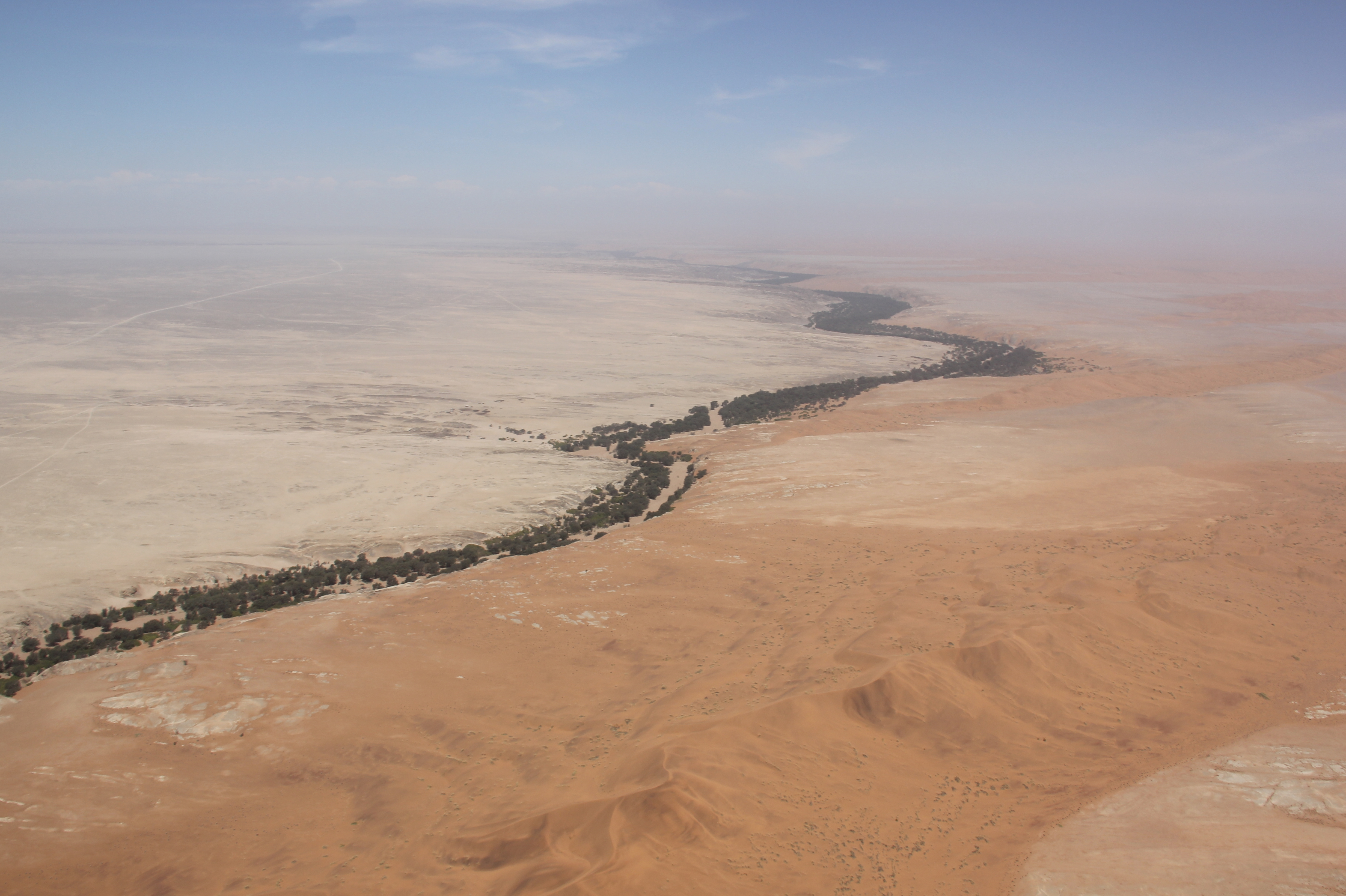 Kuiseb Dry Riverbed